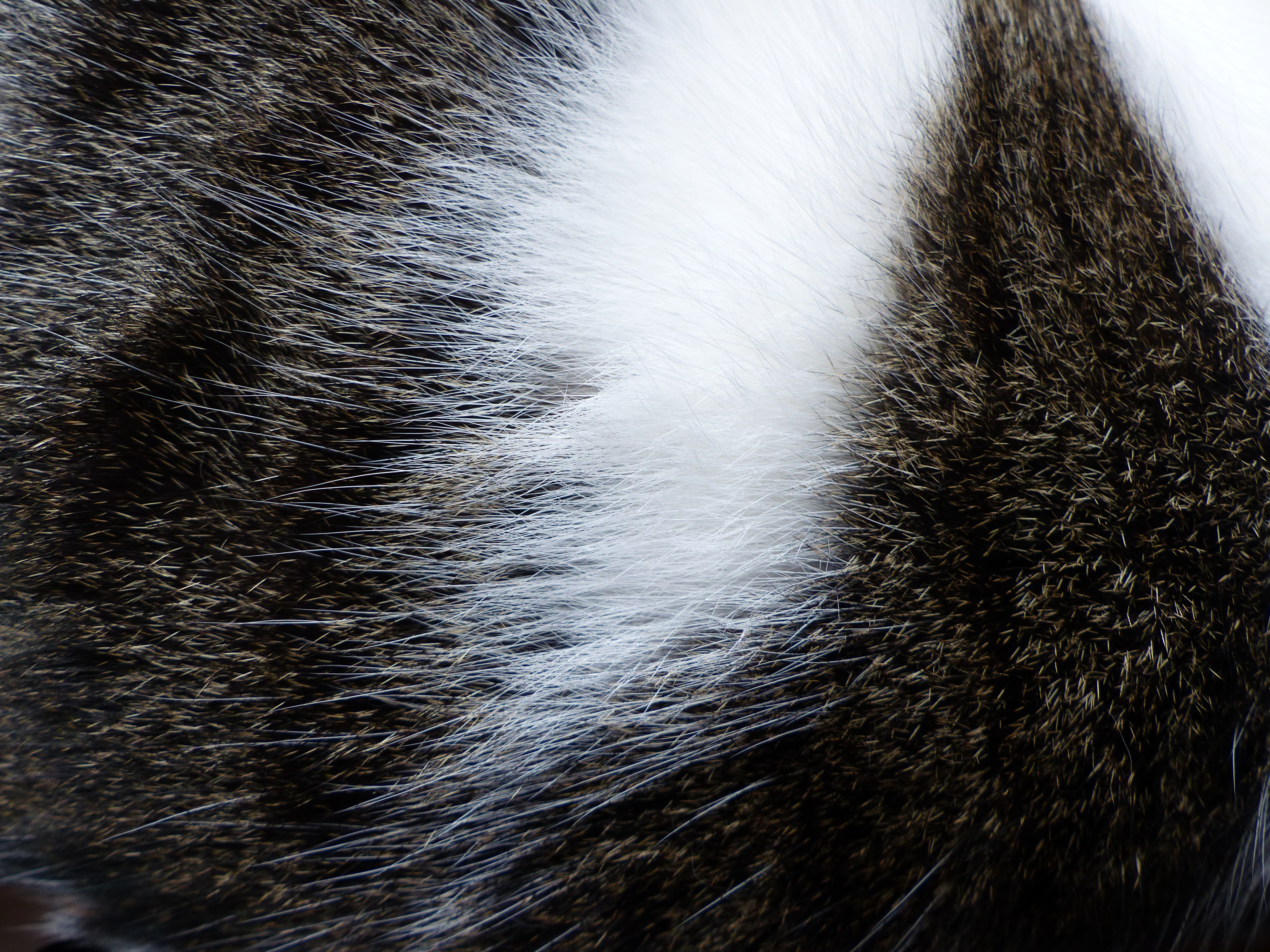 Isis, chatte européenne bicolore brown tabby harlequin de 2 ans